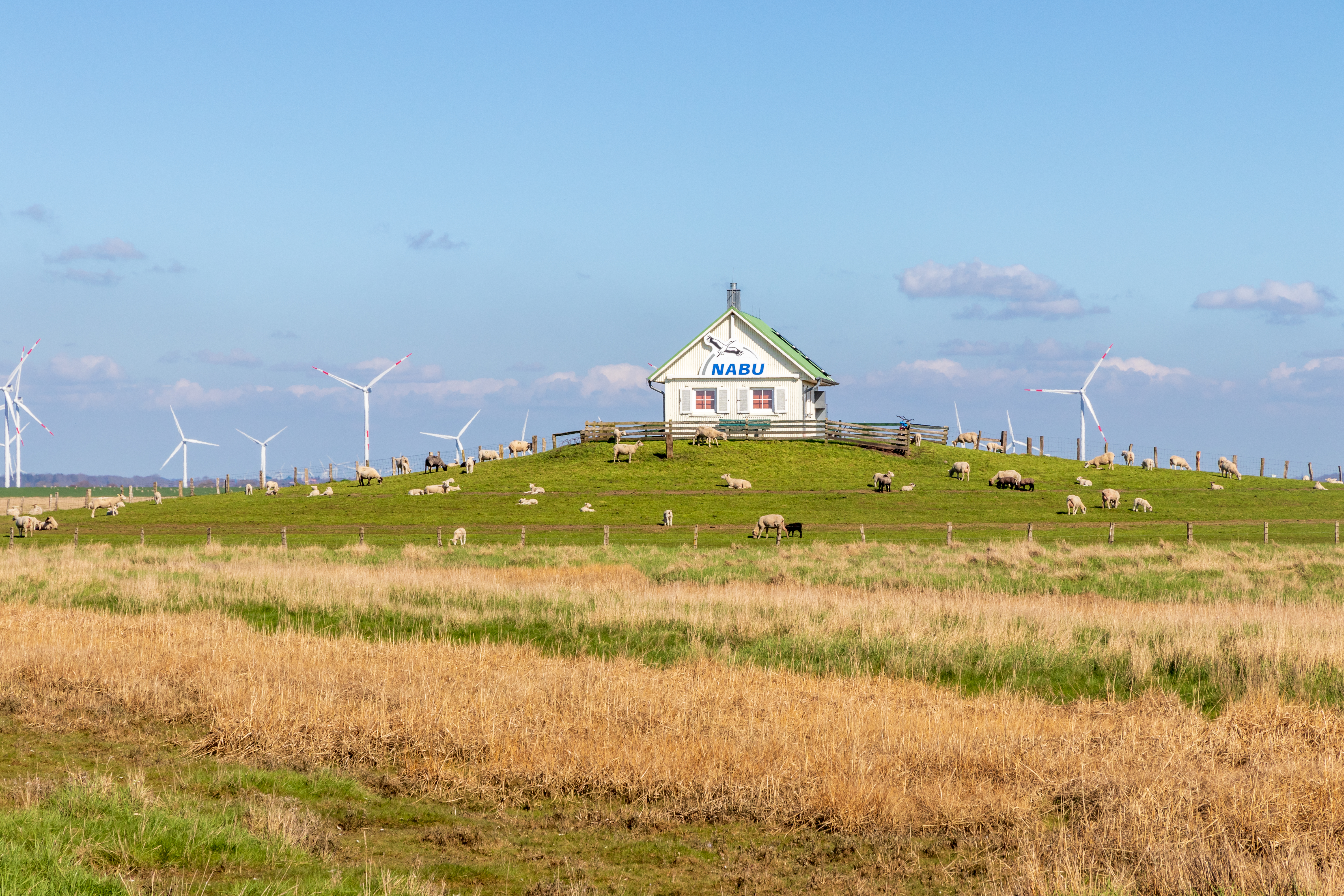 Die NABU-Schutzhütte auf der Hamburger Hallig.